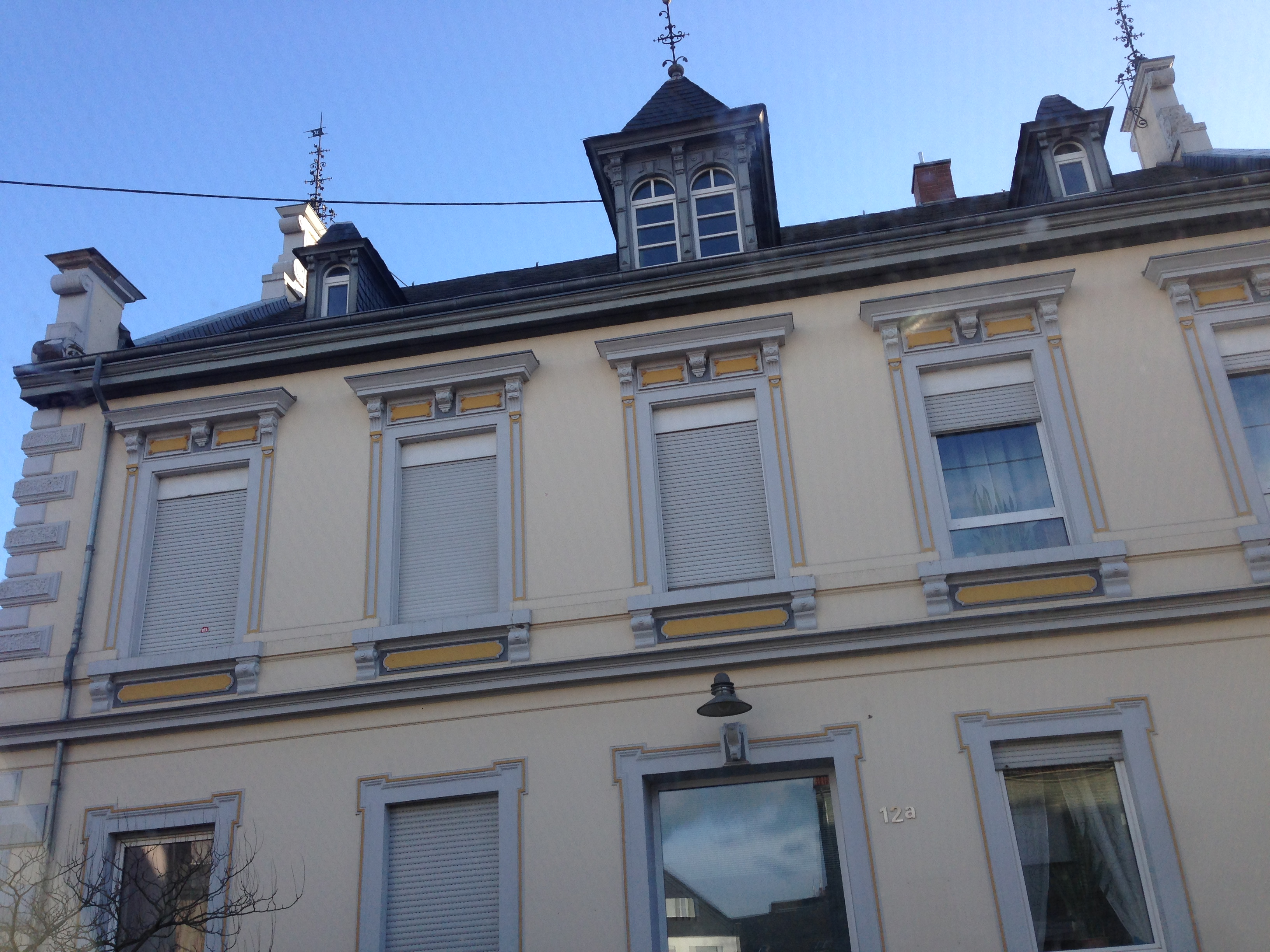 Außenaufnahme (frontal)